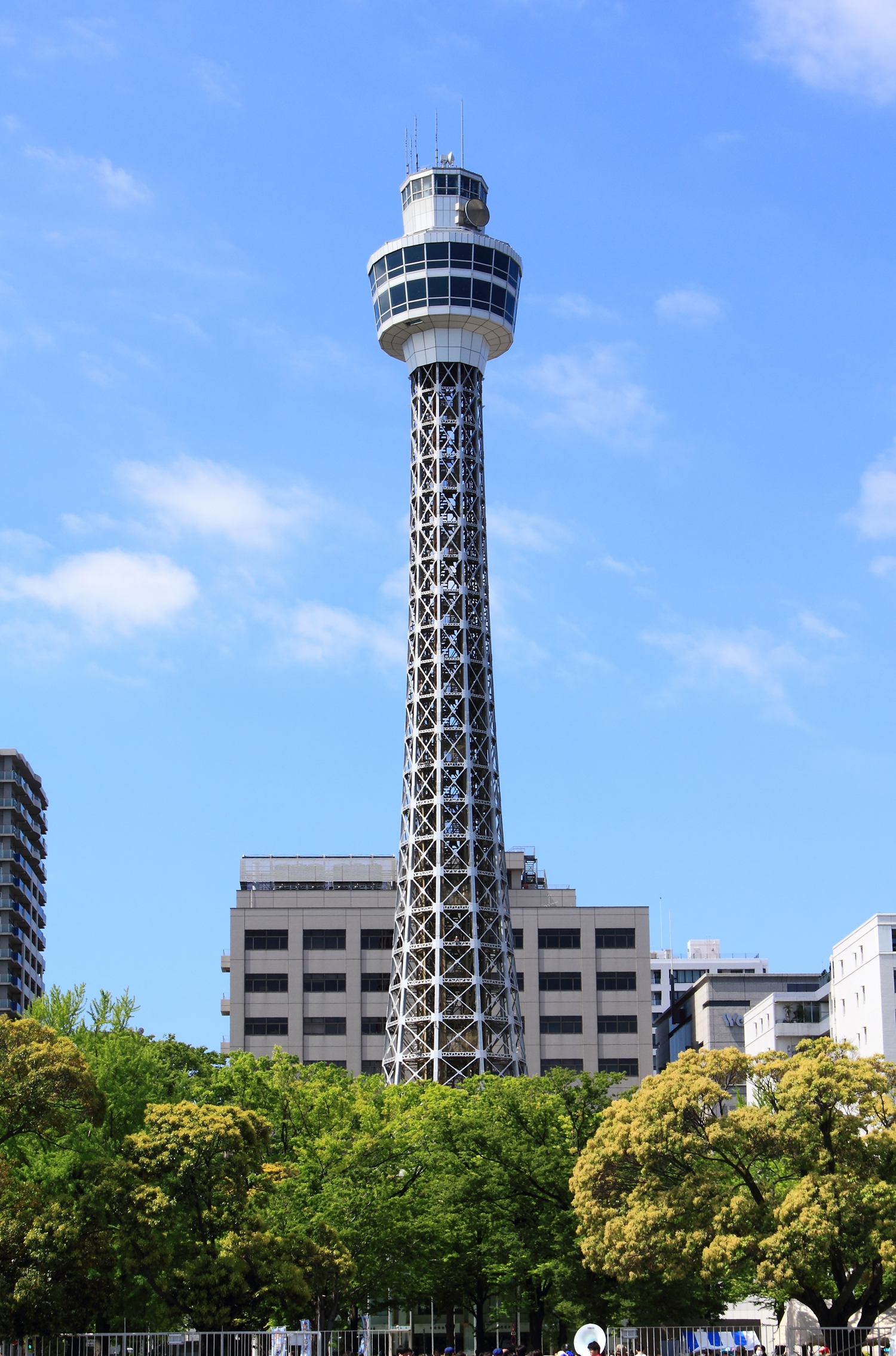 横浜マリンタワー（神奈川県）